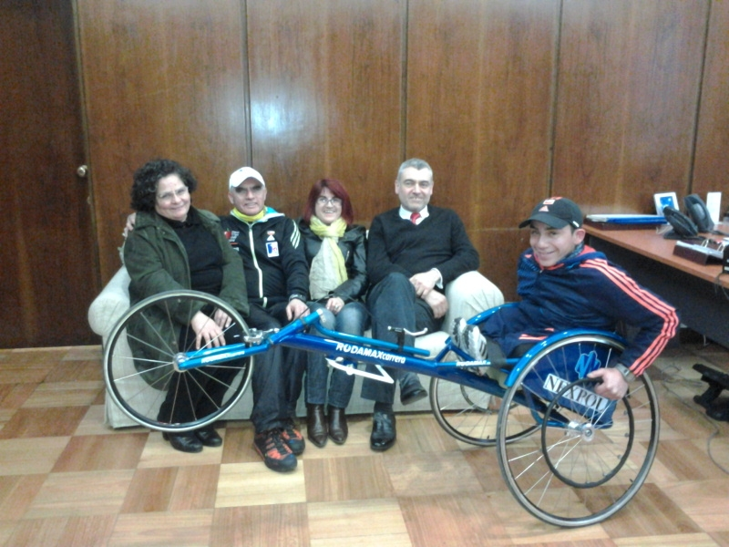 Erwin sentado entre las dos damas, Eliana y MariCarmen. Su alumno José Sapiain el 7 de Agosto de 2012 luciendo la silla deportiva donada por Nexpol en oficinas de la Dirección Nacional de IPS. También está Carlos Vergara del Río, el directivo de IPS que promovió y apoyó IPS Saludable.